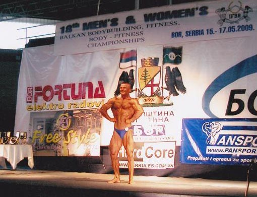 Vasile Craciun - culturist din Braila, Romania